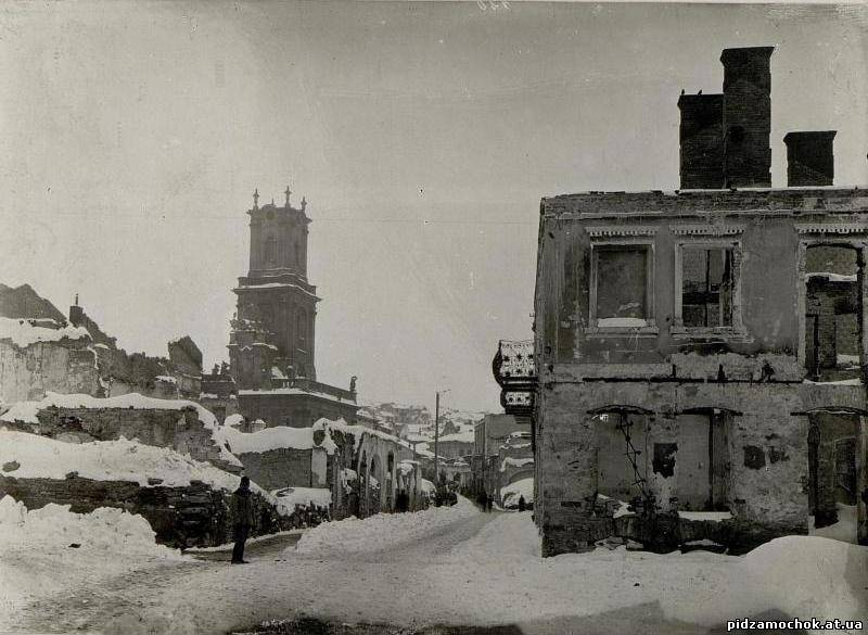 центр Бучача після руйнації московитами в І-шу світову